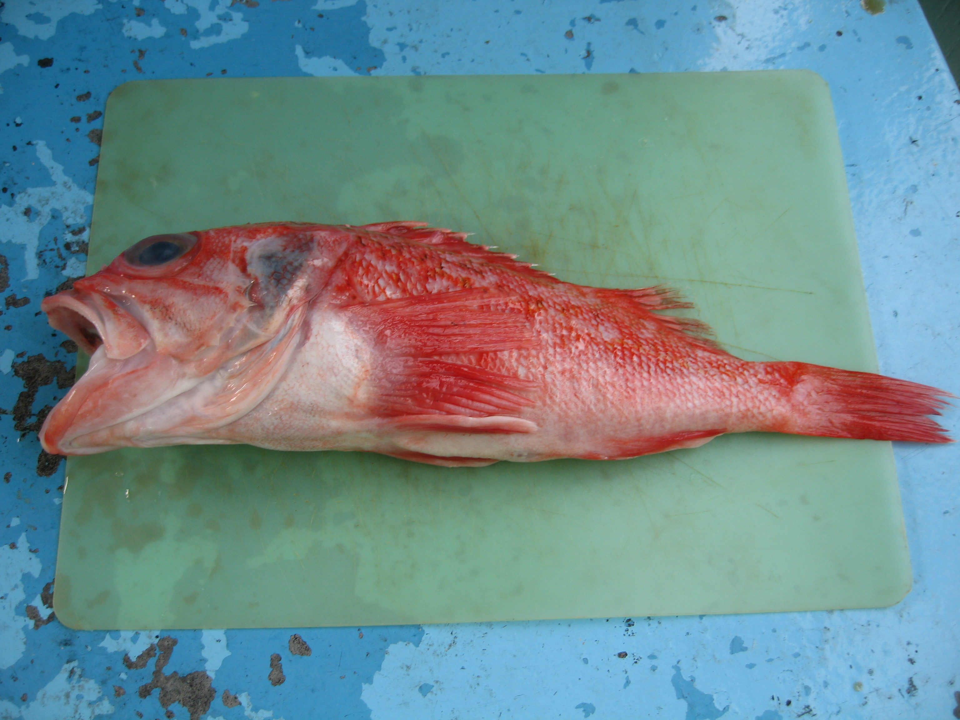 日本のカサゴ